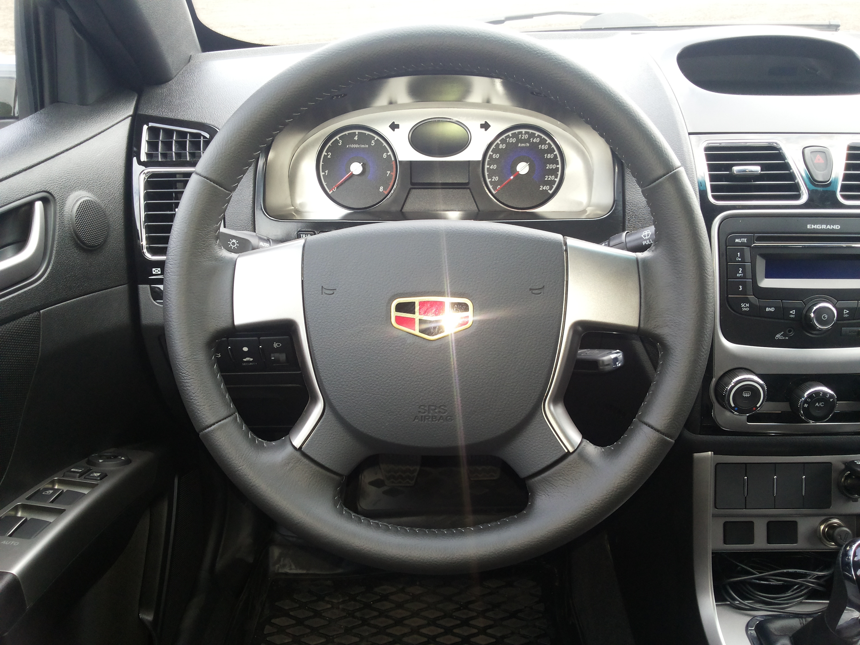 Салон седана